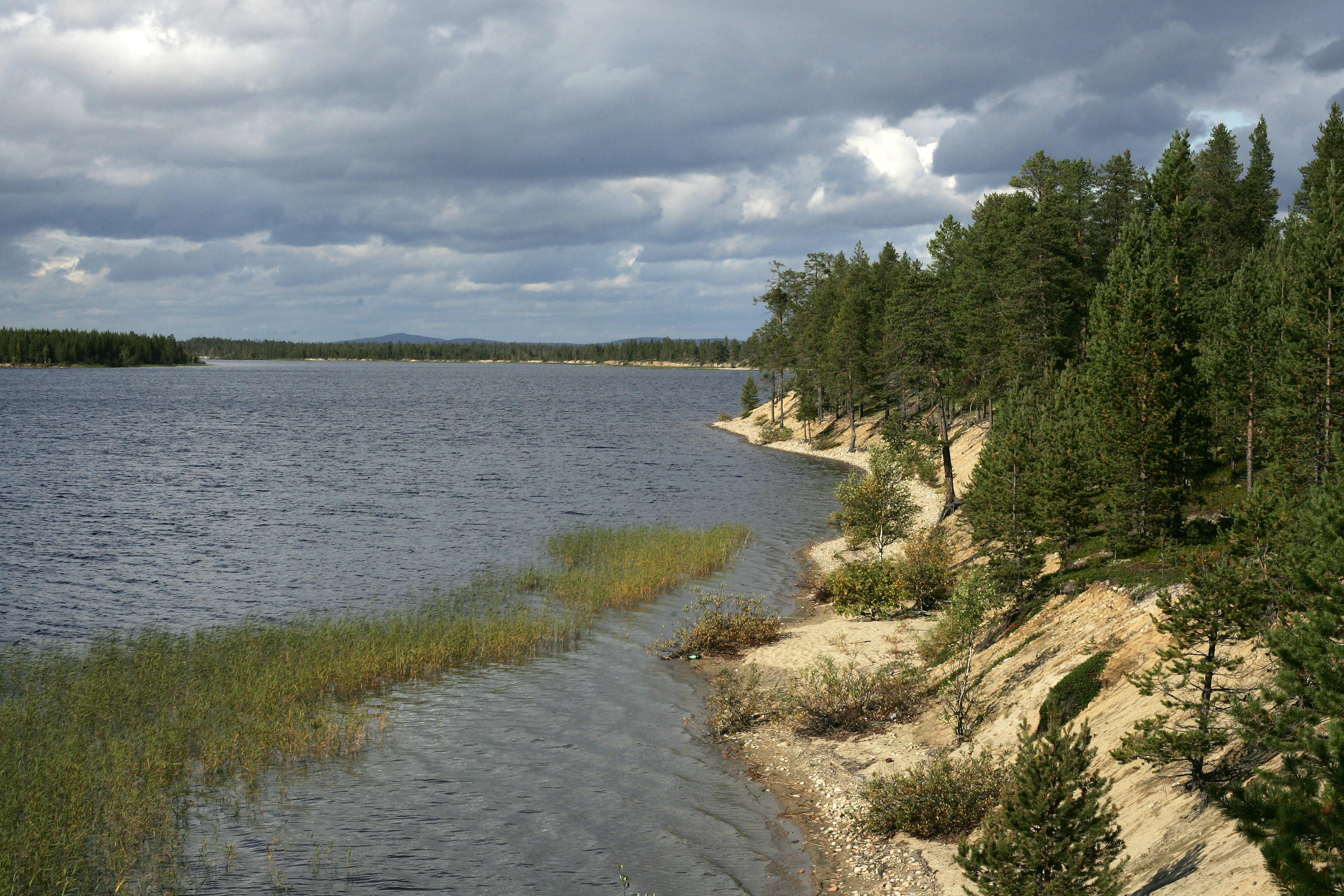 Пиренгский заказник: Ковдорский район, Мурманская область This image is related to the protected area of Russia number 5110047